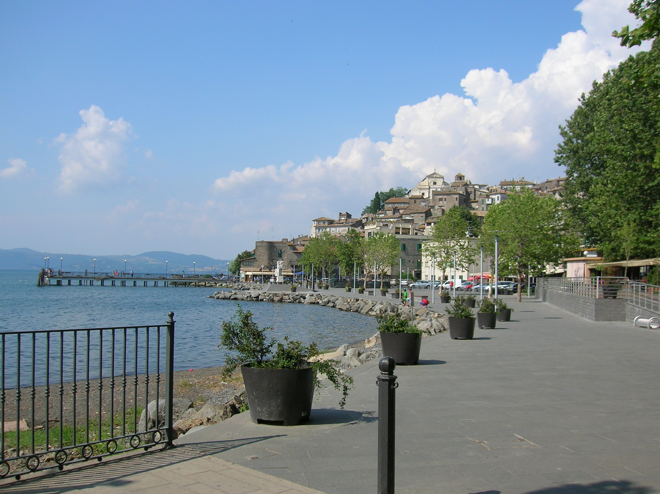 lungolago di Anguillara Sabazia, Lazio, Italia